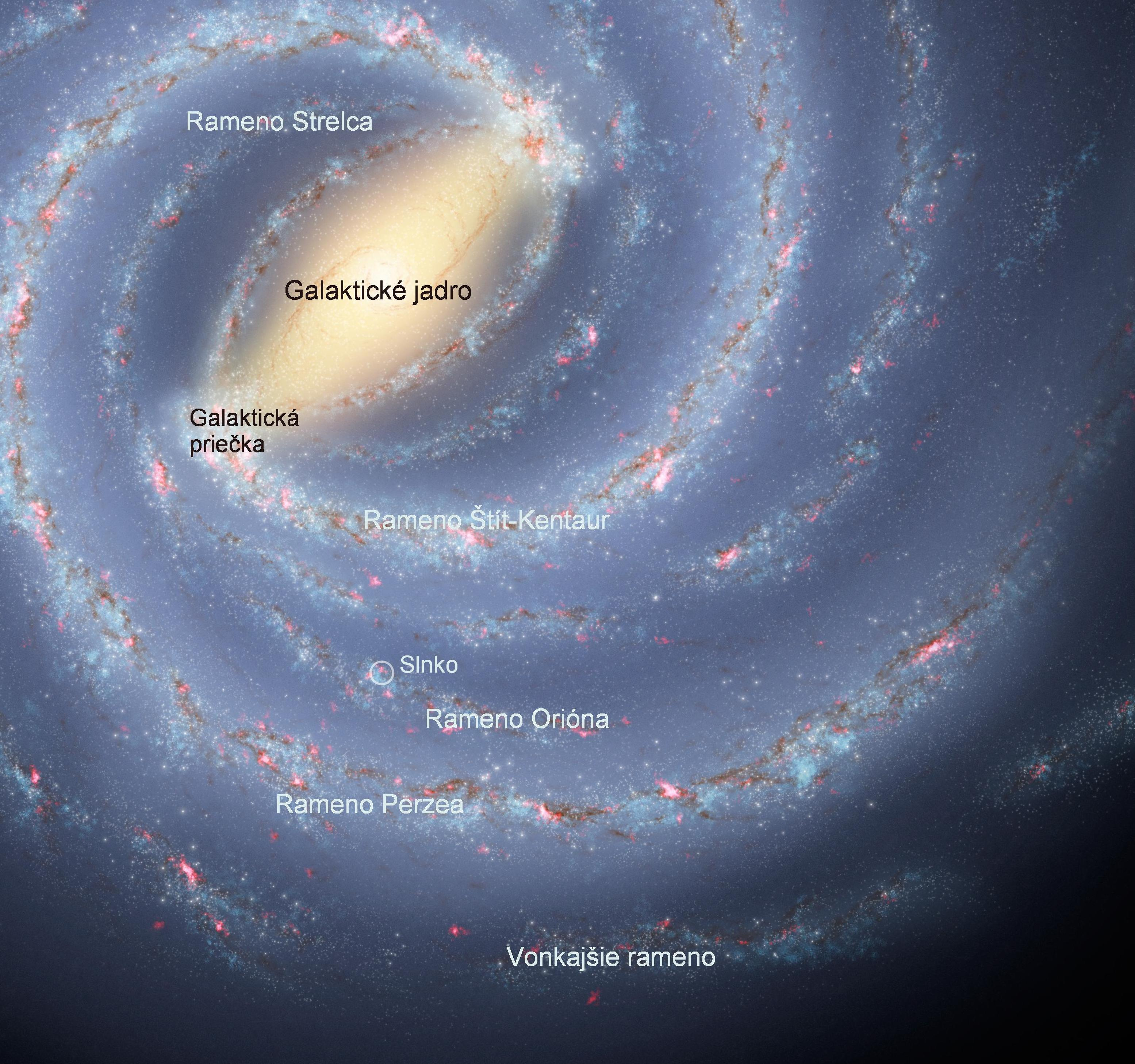 Časť galaxie Mliečnej dráhy so slovenskými popiskami; prevzaté z File:Milky Way 2005.jpg